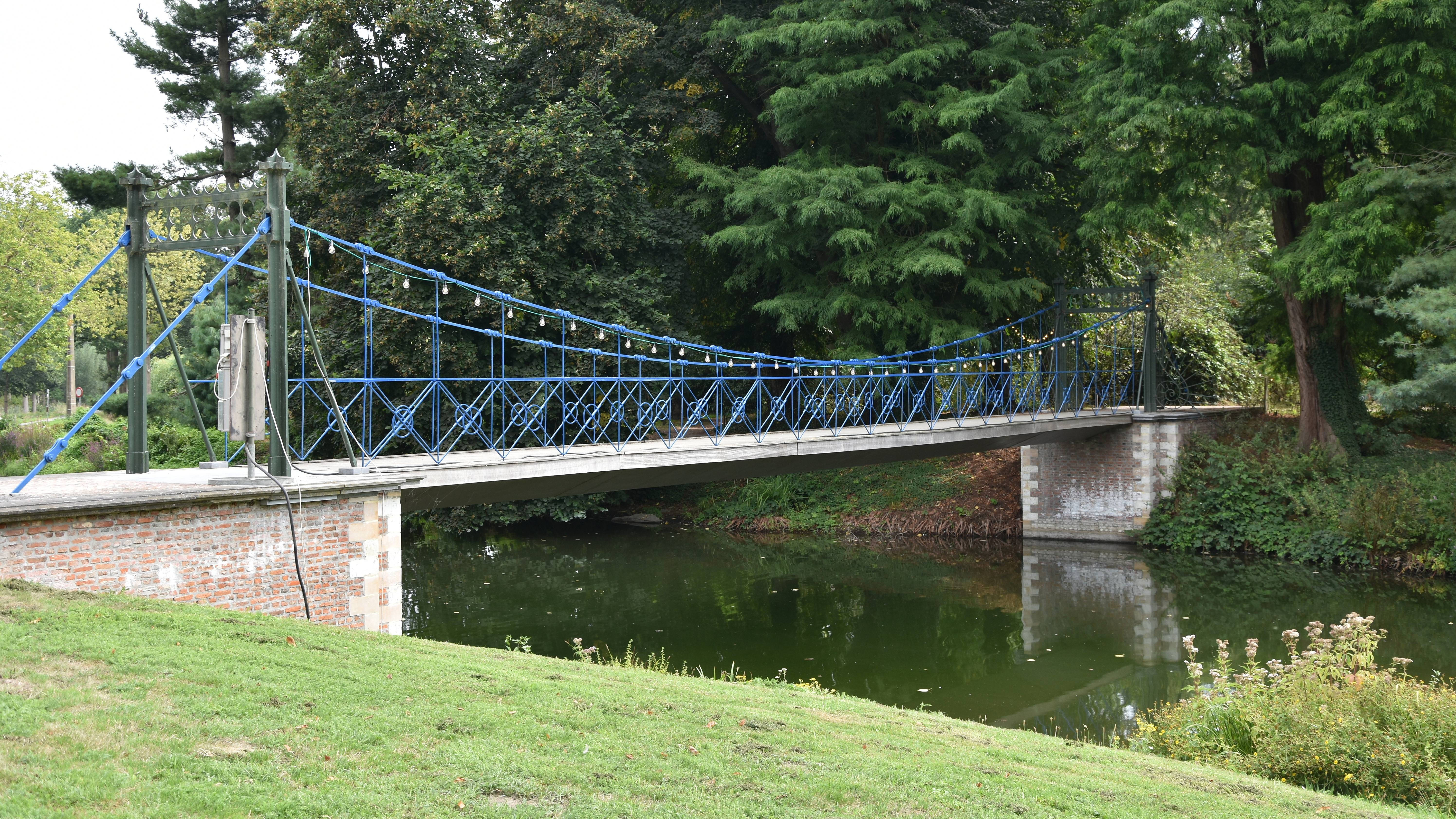 Gietijzeren hangbrug - Kasteel Wissekerke 21-08-2018 This photo of immovable heritage has been taken in the Flemish Region